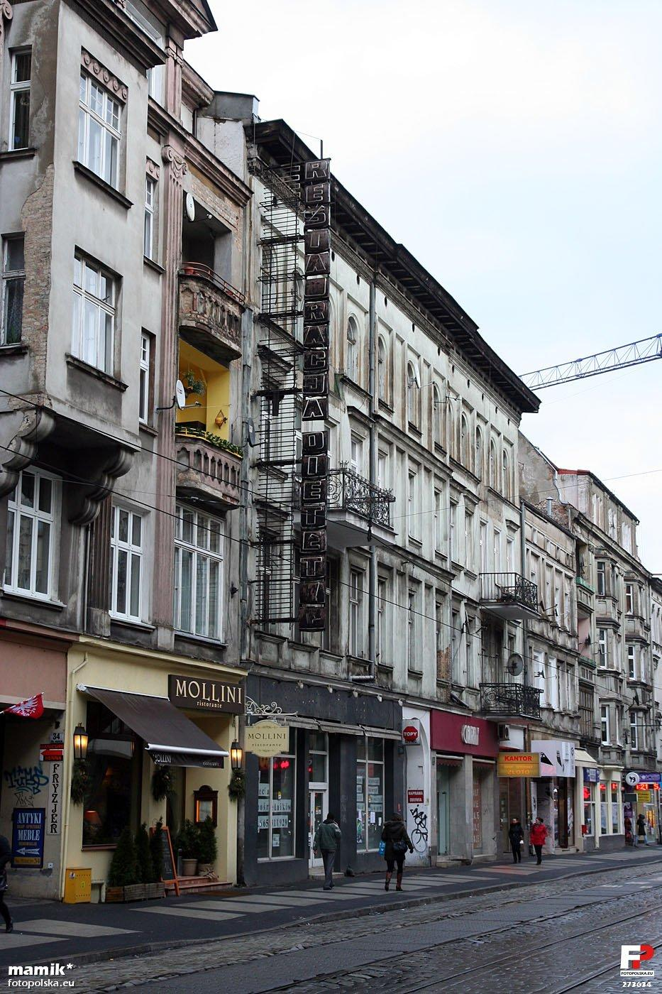 Na parterze kamienicy działa kiedyś restauracja "Dietetyk" po której został tylko (niedziałający zapewne) neon